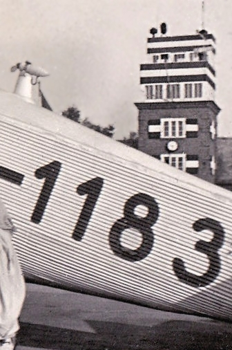 Alter Flughafen Dresden (Heller) mit der dem Flugfeld zugewandten Nordwestfront des Abfertigungsgebäudes; in unmittelbarer Nähe des heutigen S-Bahn-Haltepunktes „Industriegelände“; ungefähr 30-40 m hinter dem Gebäude und parallel dazu verlaufen die Bahngleise. Im Vordergrund die Junkers F 13 „Albatros“ (WNr. 569, D-1183) der Luft Hansa.